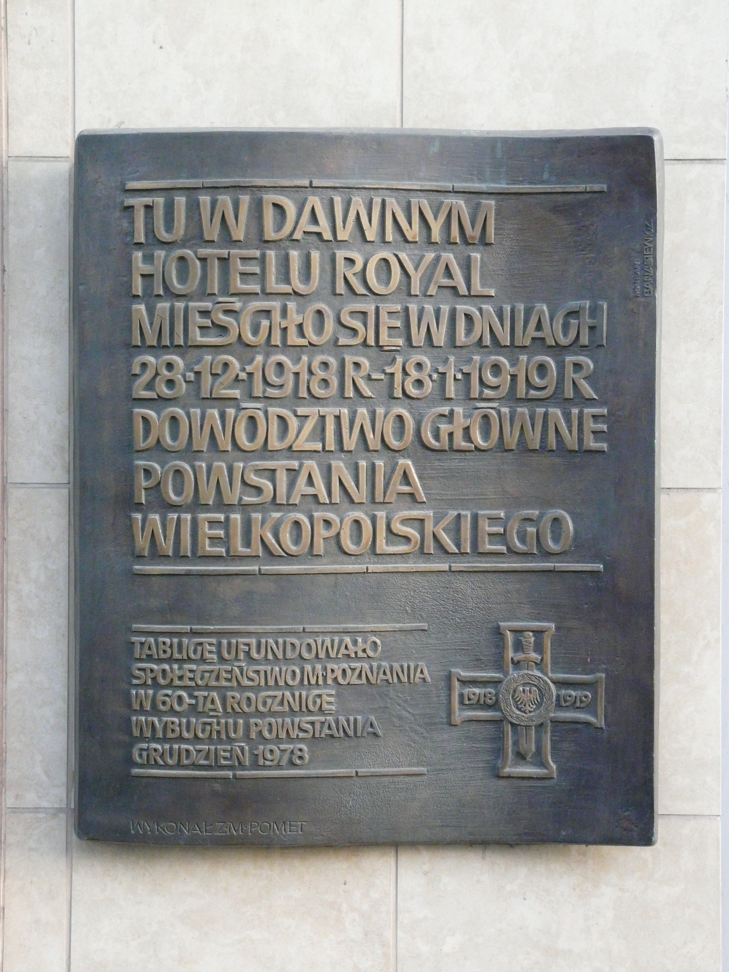 Poznań.